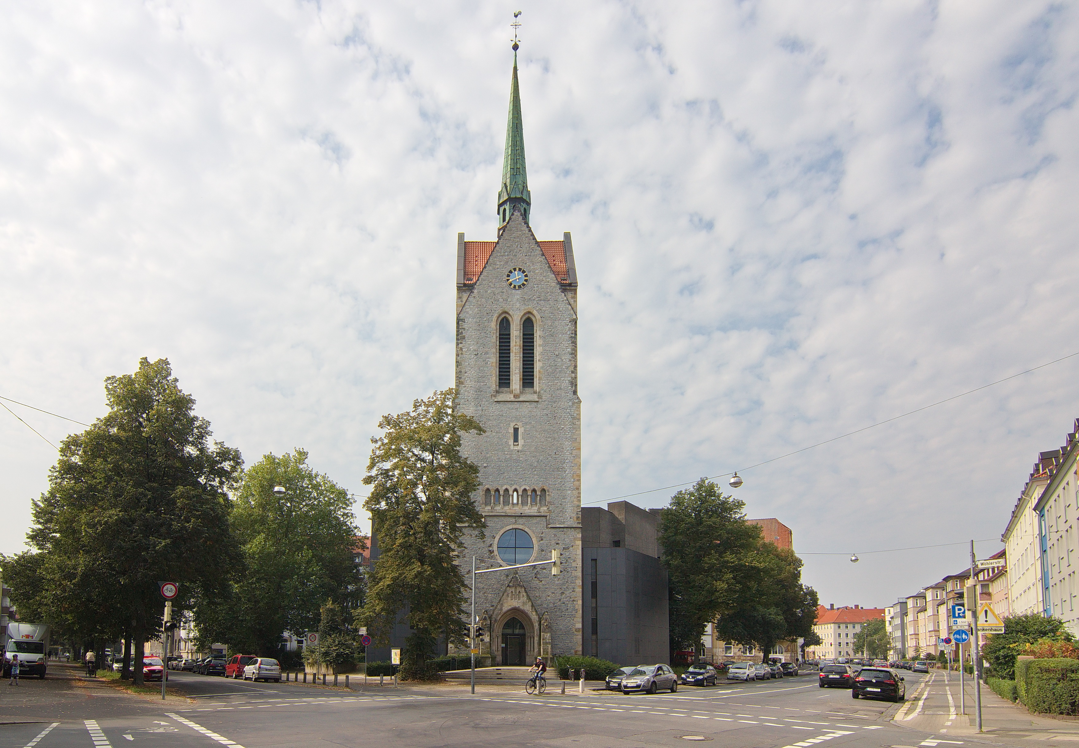 Lister Matthäuskirche (Hannover), Niedersachsen, Deutschland